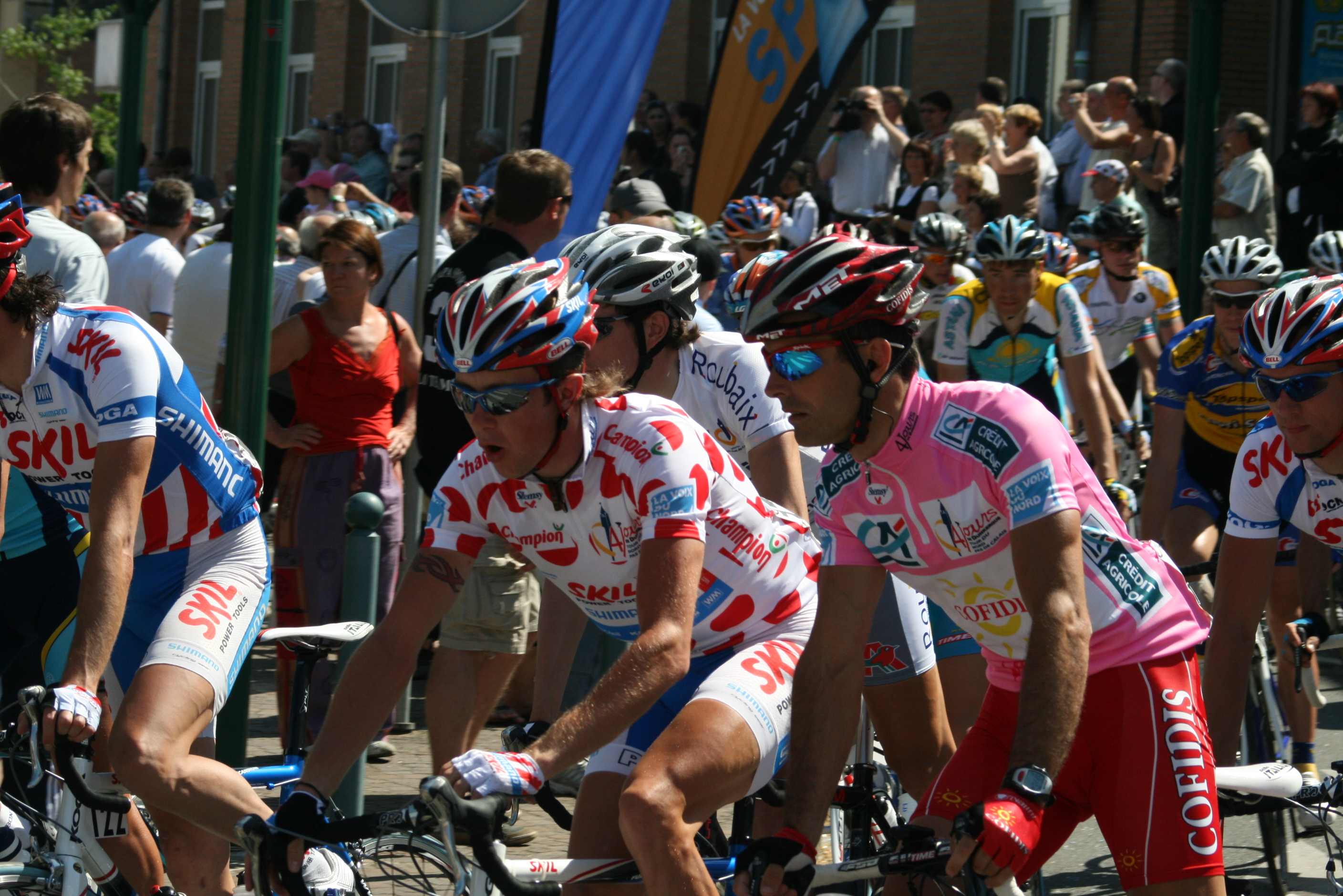 Départ de la 4ème étape des Quatre jours de Dunkerque 2008 à Wasquehal